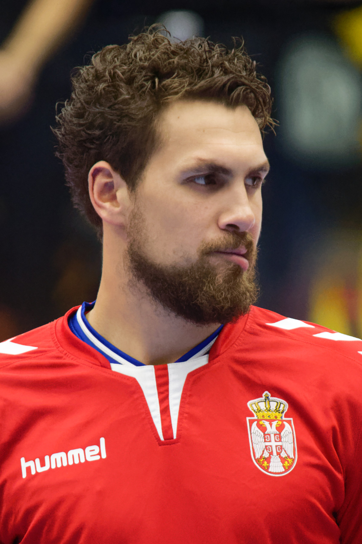 Freundschaftliches Handballspiel Österreich gegen Serbien am 28.10.2017 im BSFZ Südstadt. Bild zeigt: Bogdan Radivojević